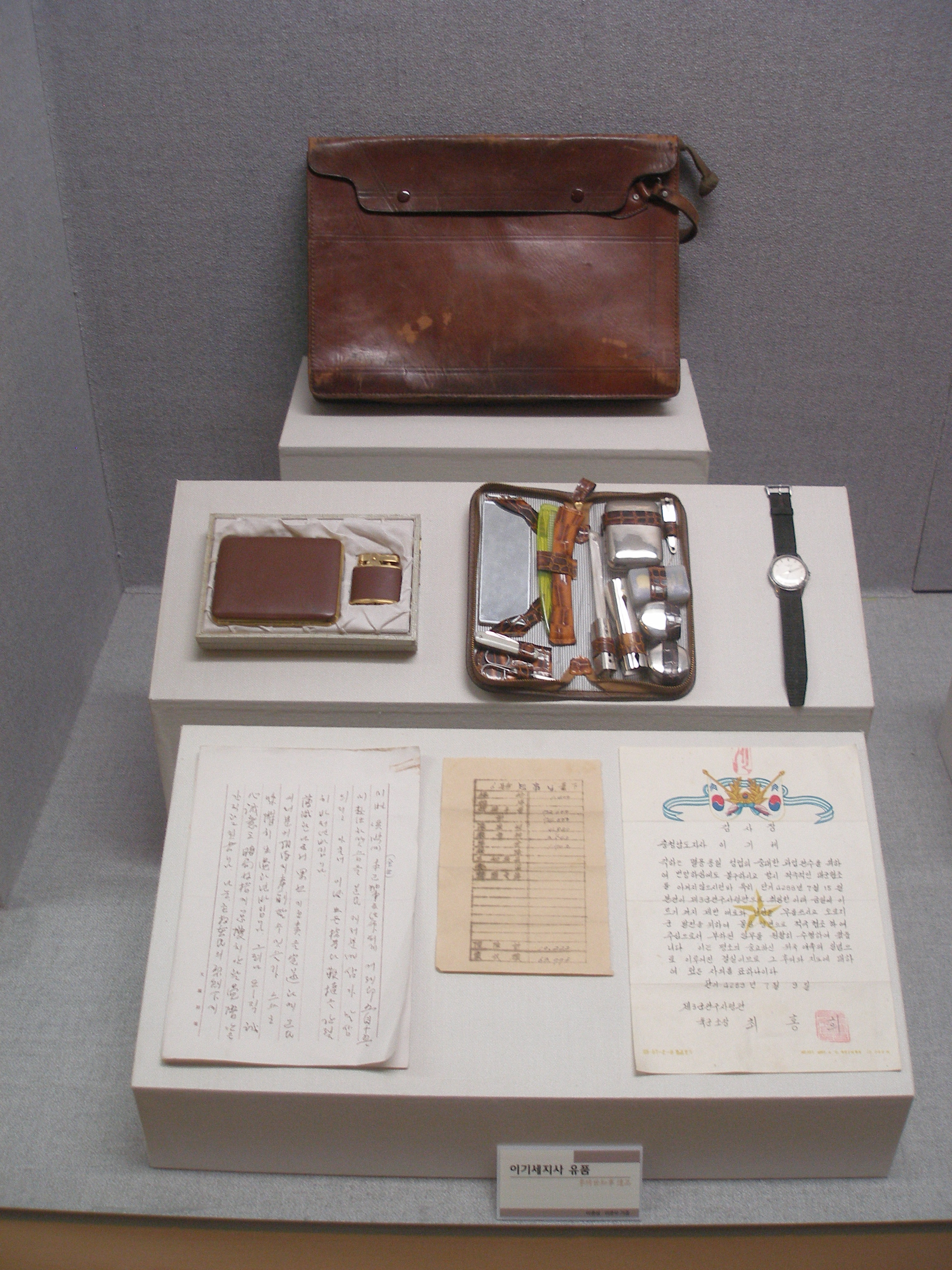 충청남도 도지사를 지낸 이기세의 유품 (충청남도역사박물관 전시)